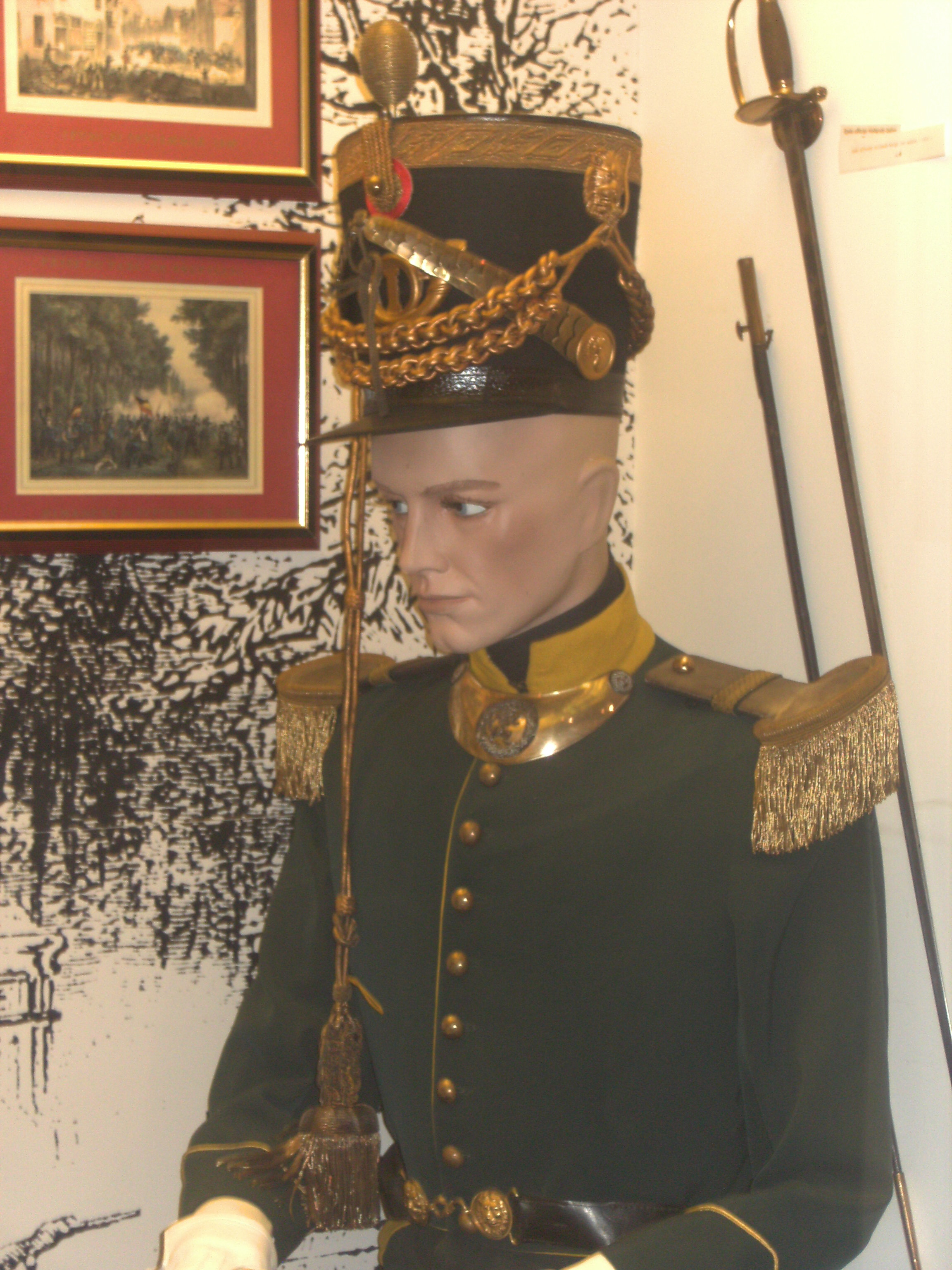 Uniforme d'officier de régiment de Chasseurs à pied belge, unité créé en 1831. Mannequin exposé dans le musée des Chasseurs à pied à Charleroi.